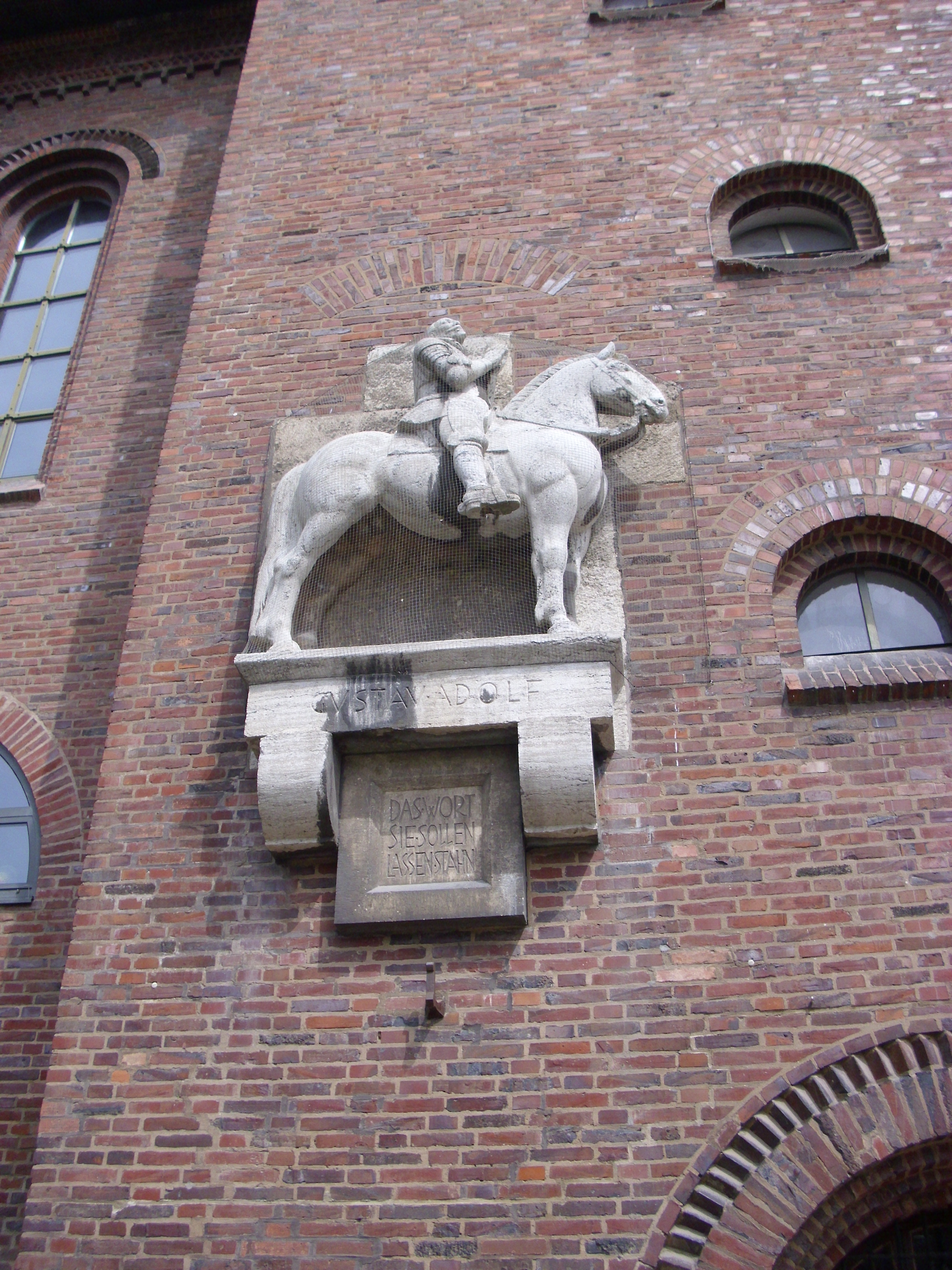 Gustav-Adolf-Reiterstandbild an der Fassade der evangelischen Gustav-Adolf-Gedächtniskirche in Nürnberg-Lichtenhof; Kirche erbaut 1927-1930 nach Entwurf von German Bestelmeyer, Plastik 1930 ausgeführt nach Modell des Bildhauers Konrad Roth; nach schweren Kriegsschäden 1947-1949 wiederaufgebaut; unter Denkmalschutz